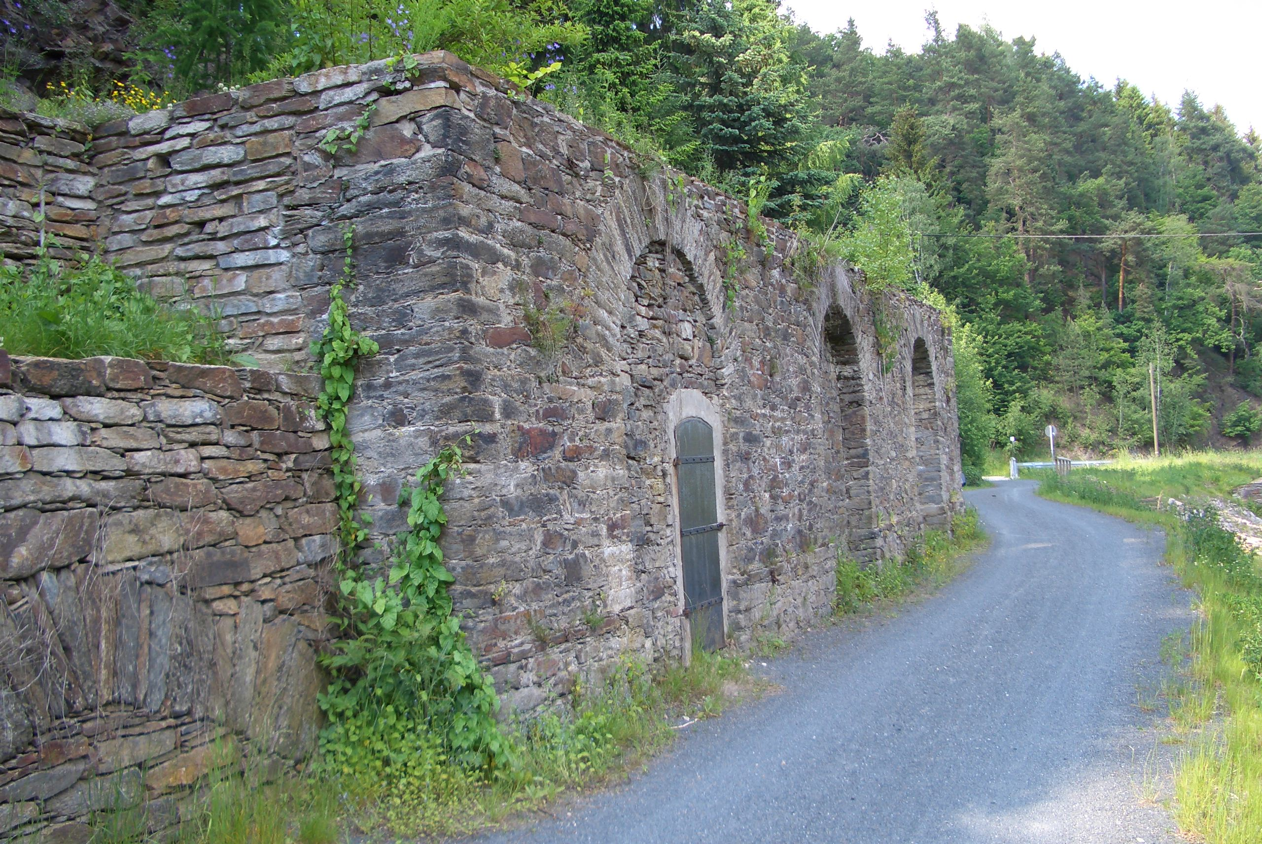 Das Kahnhebehaus Großvoigtsberg, Großschirma, Landkreis Mittelsachsen, Sachsen, Deutschland.